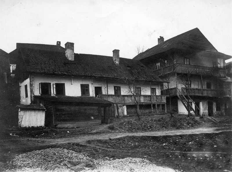 Żydowska dzielnica mieszkaniowa w Sanoku 1914.jpg